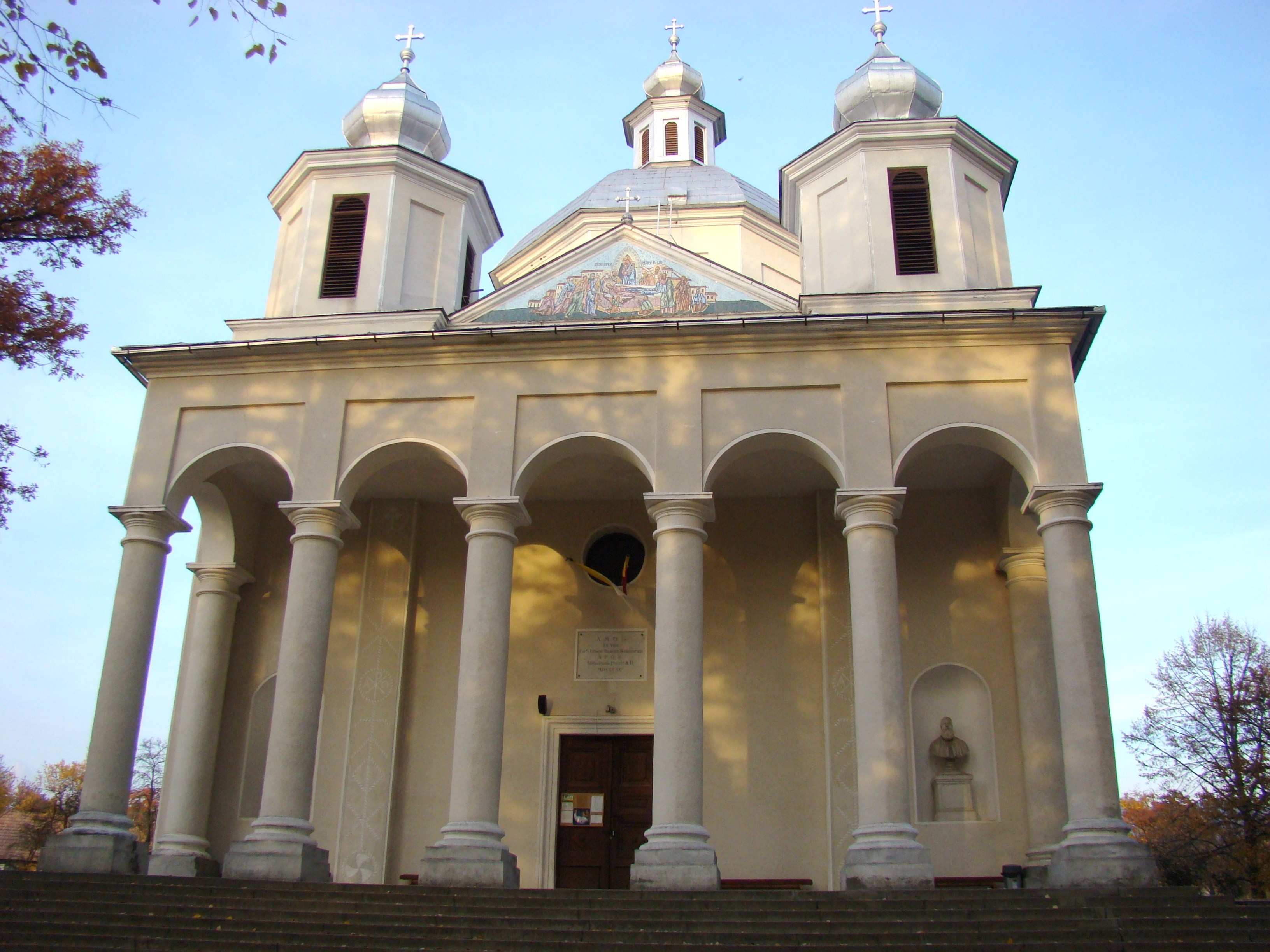 Biserica Unirii Tuturor Românilor "Adormirea Maicii Domnului", sat Șișești; comuna Șișești, județul Maramureș 01